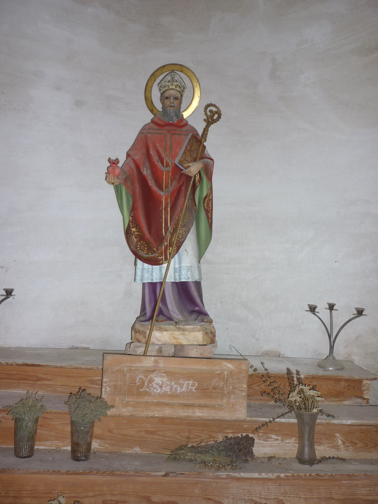 Església de Sant Agustí d'Isanta (Lladurs): imatge del Sant